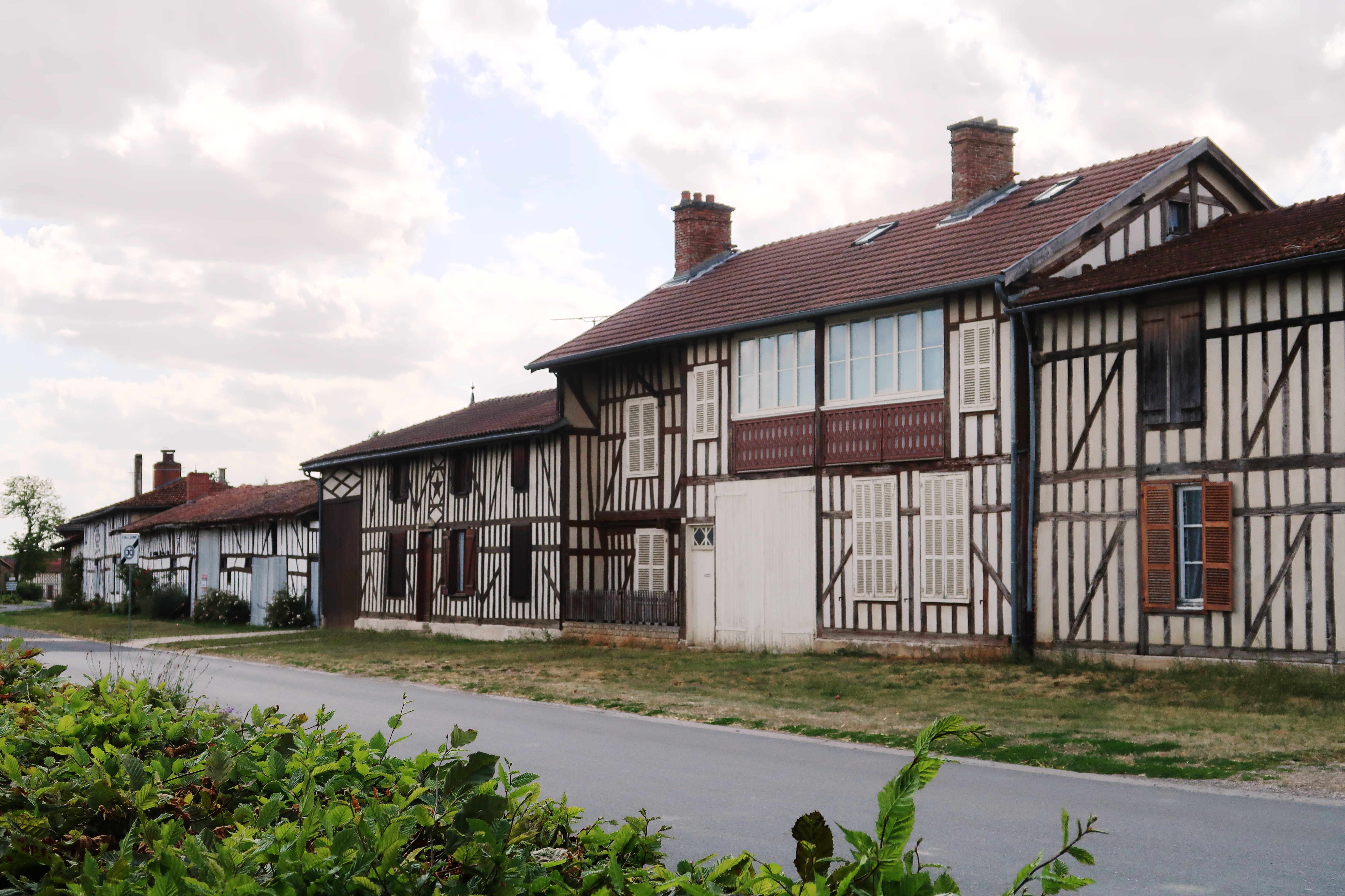 Outines, maisons à pan de bois, Grande rue